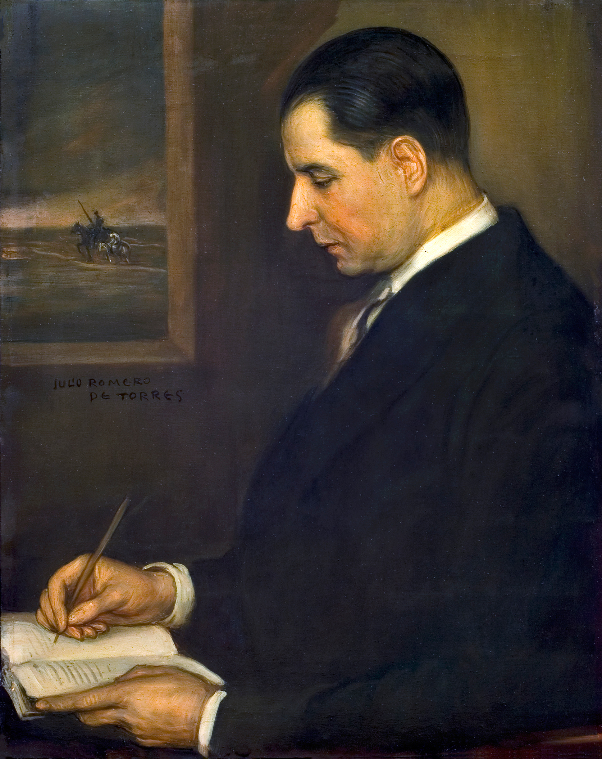 Retrato de José Félix Huerta Calopa, íntimo amigo del pintor Julio Romero de Torres, realizado en 1928. Pintado al temple y al óleo, mide 65 por 50 cm. Fue alcalde de Alcalá de Henares entre 1939 y 1941.